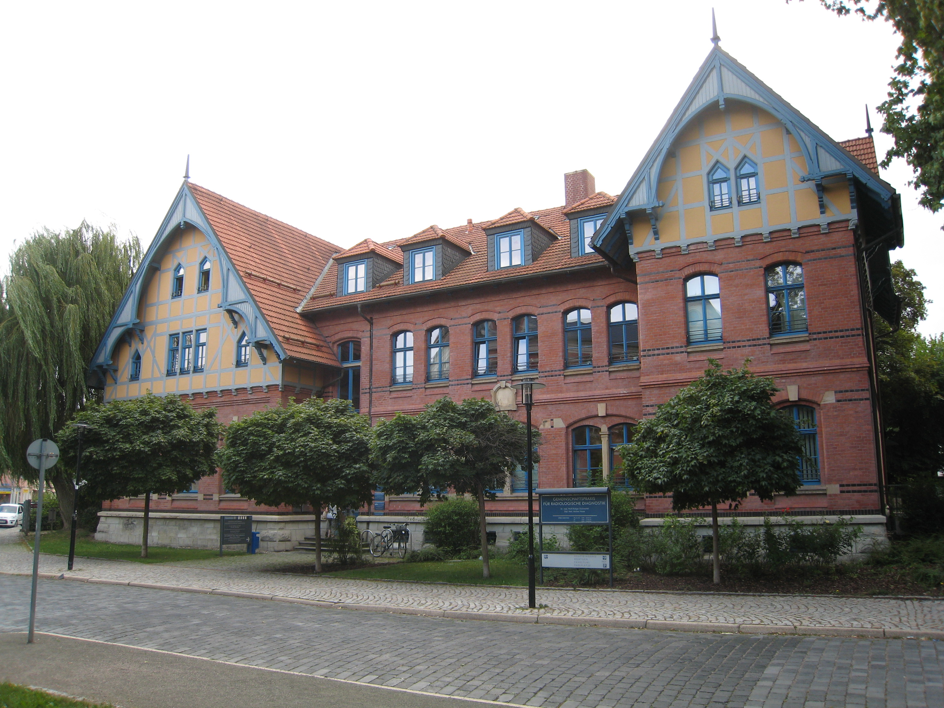 Ehemaliges Waisenhaus, heute Ärztehaus in Arnstadt, Rosenstraße 50